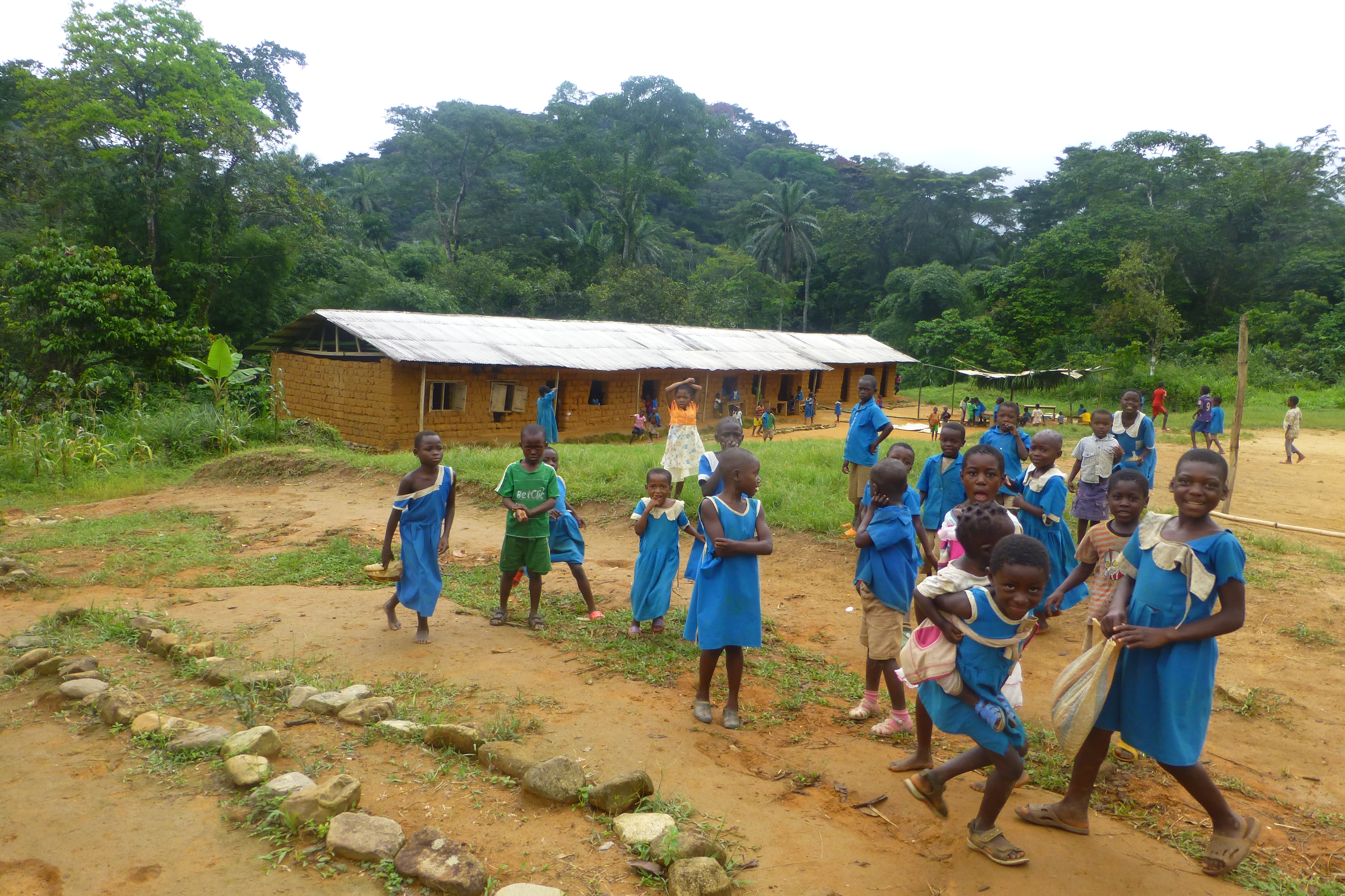 Sanctuaire de Bayang Mbo